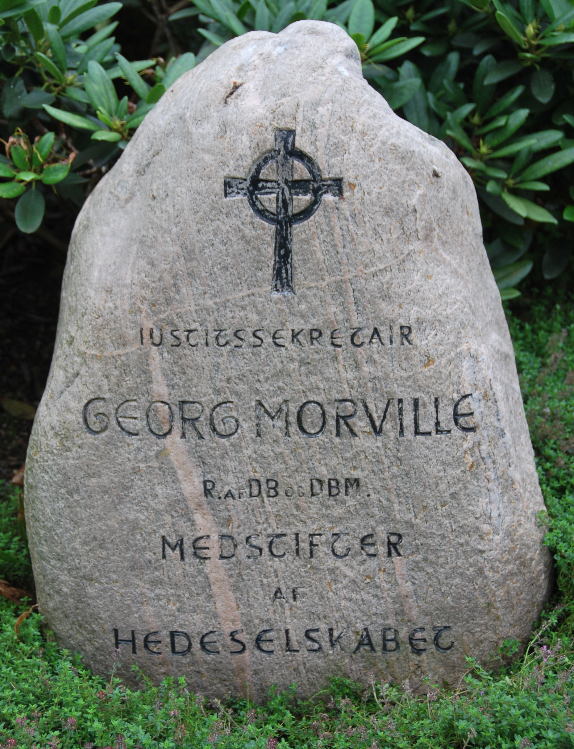 Gravsten for justitssekretær og medstifter af Hedeselskabet, Niels Georg Christian Morville (1817-1904). Placeret på Viborg Kirkegård.